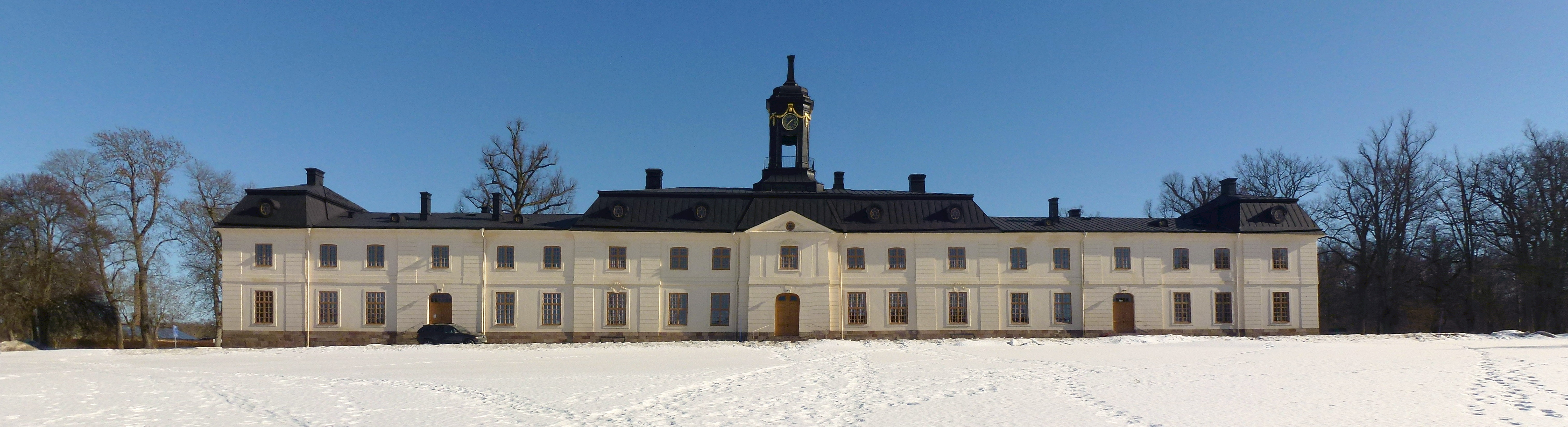 Svartsjö slott panorama, fasad mot väst